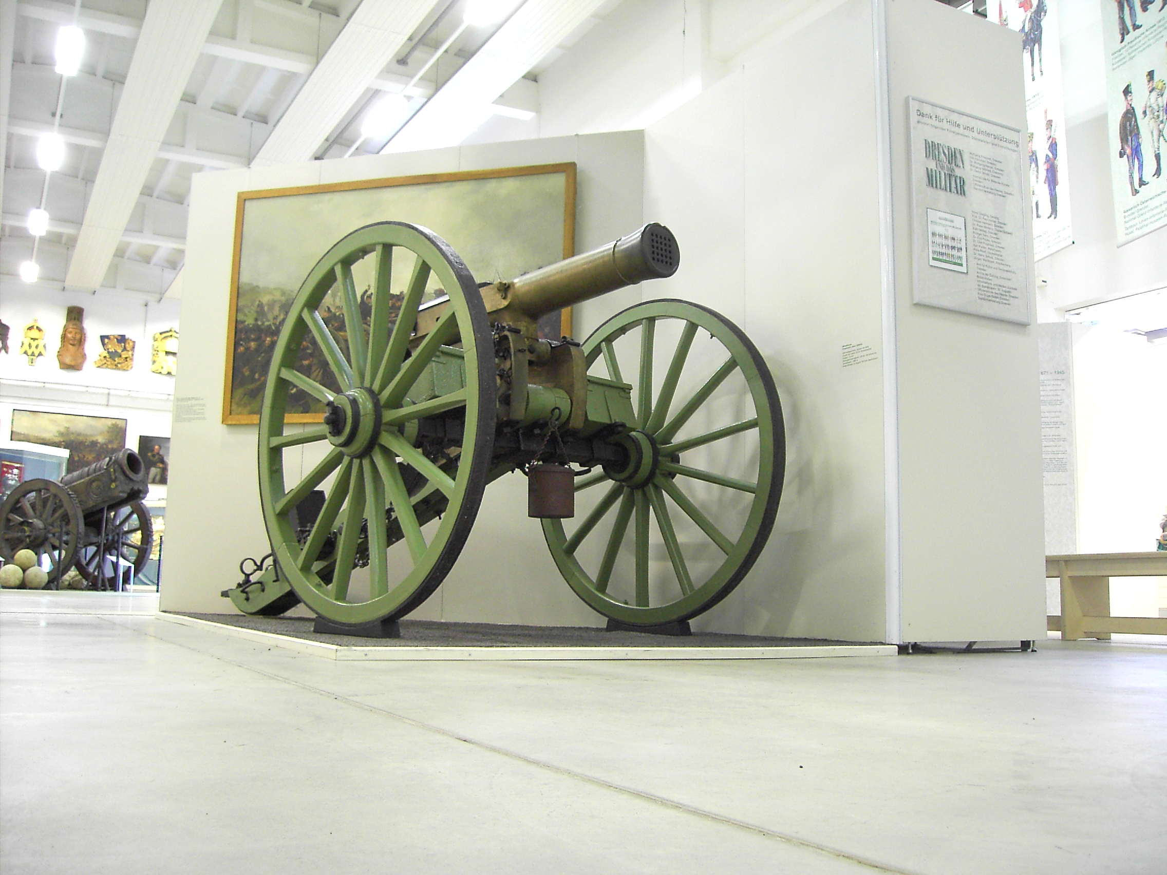 Mitrailleuse, Militärhistorisches Museum der Bundeswehr